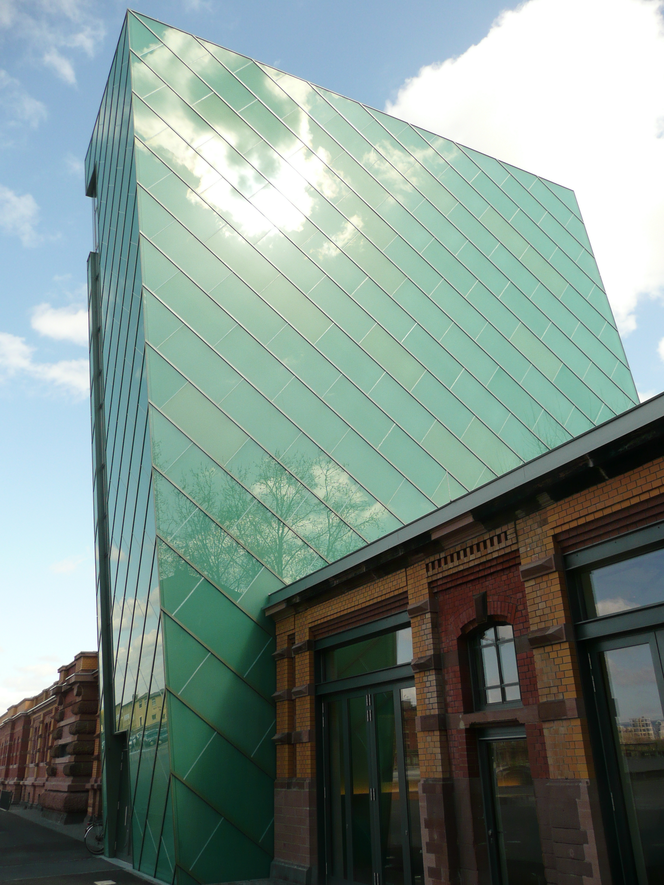 Kunsthalle Mainz; Architect Old Kesselhaus: Kreyssig; Green tower: Günter Zamp Kelp